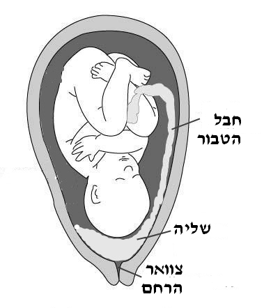 מצב שליית פתח בלידה